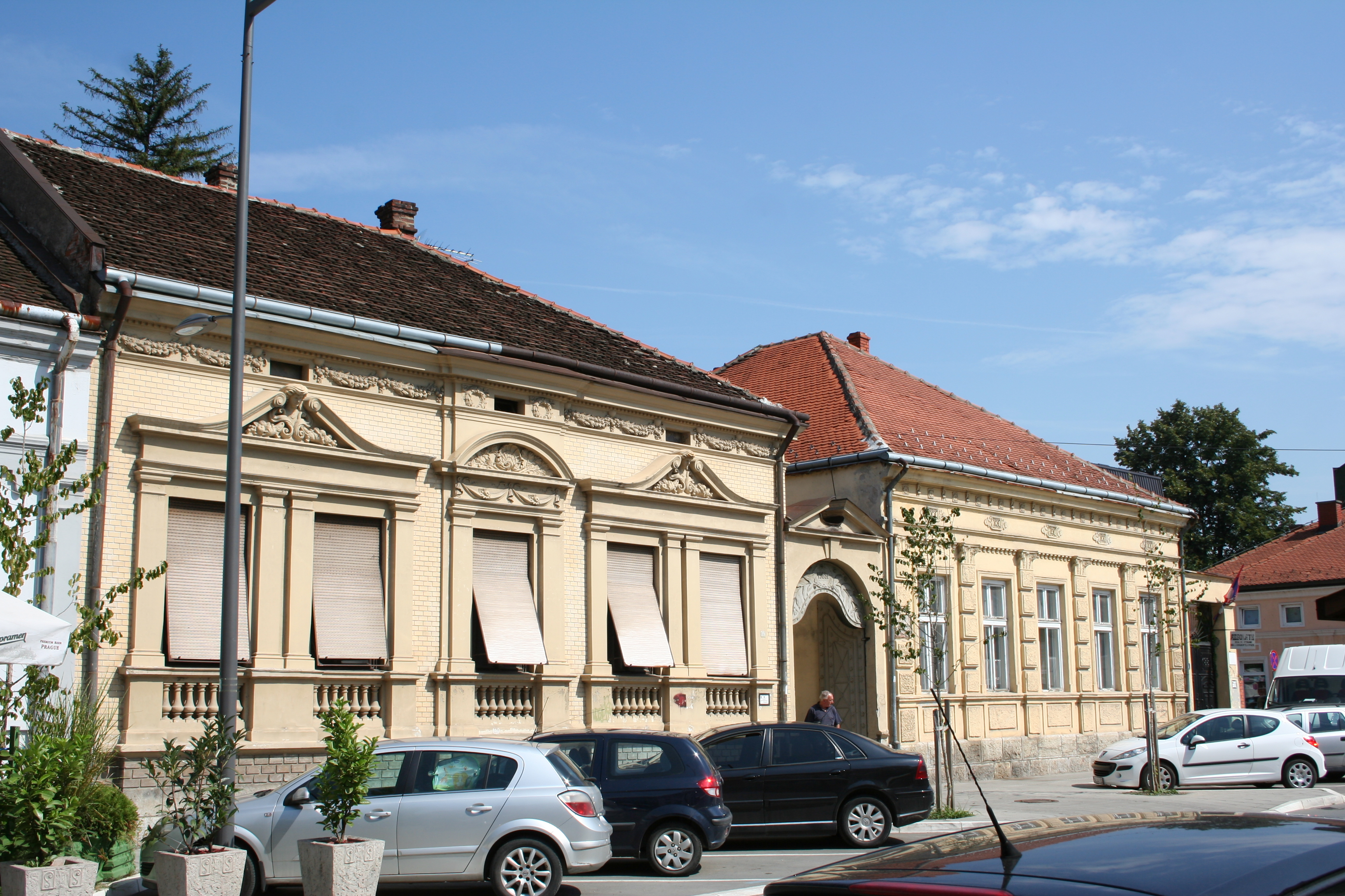 Kuća, Karađorđeva 41, Valjevo